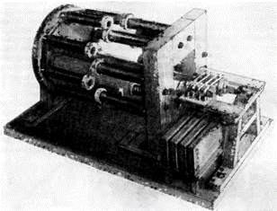 Действующая модель электродвигателя Б.С. Якоби. Государственный Политехнический музей. Москва. Репродукция к книге "История физики и техники"